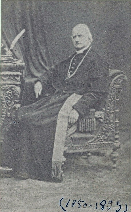 Photographie de Mgr Pierre-Simon de Dreux-Brézé, évêque de Moulins (1849-1893) Collection personnelle